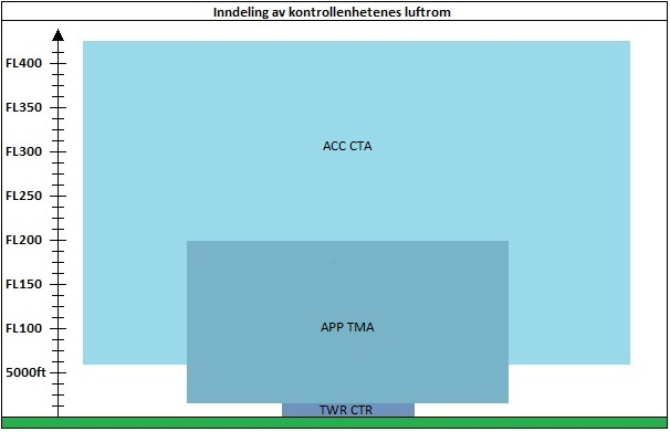 atcluft